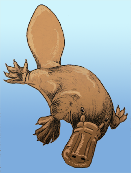 Tegning af næbdyr